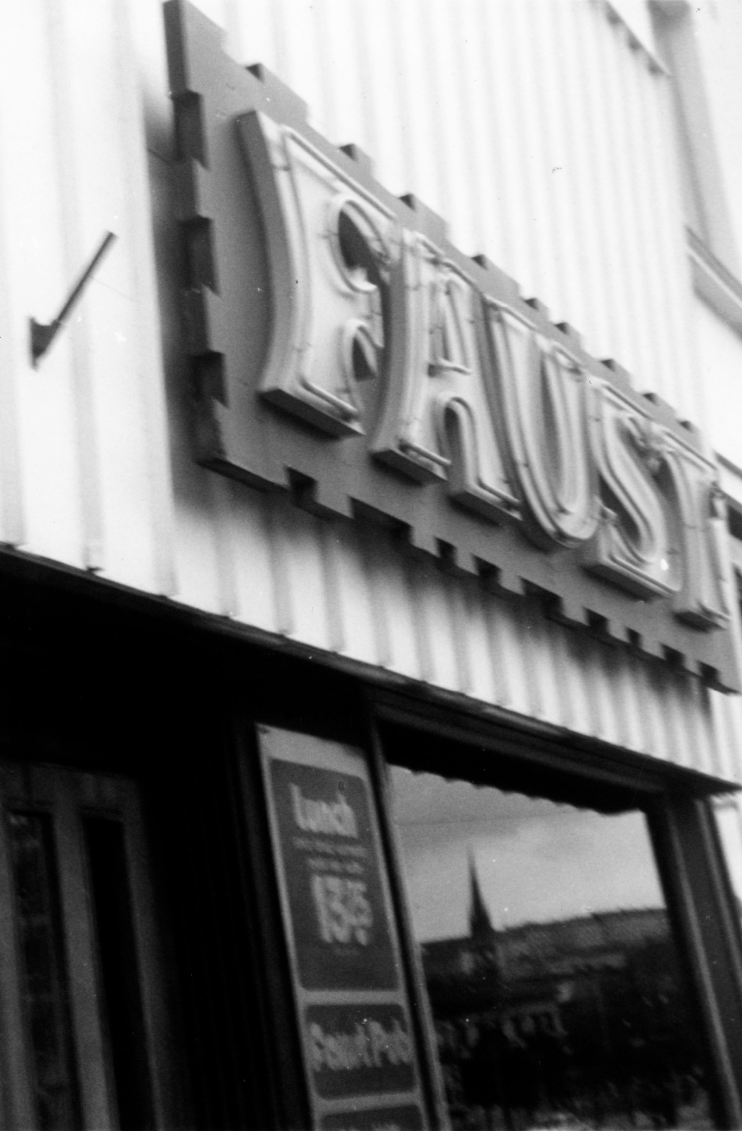 Faust (nattklubb), Pustervik (1972).